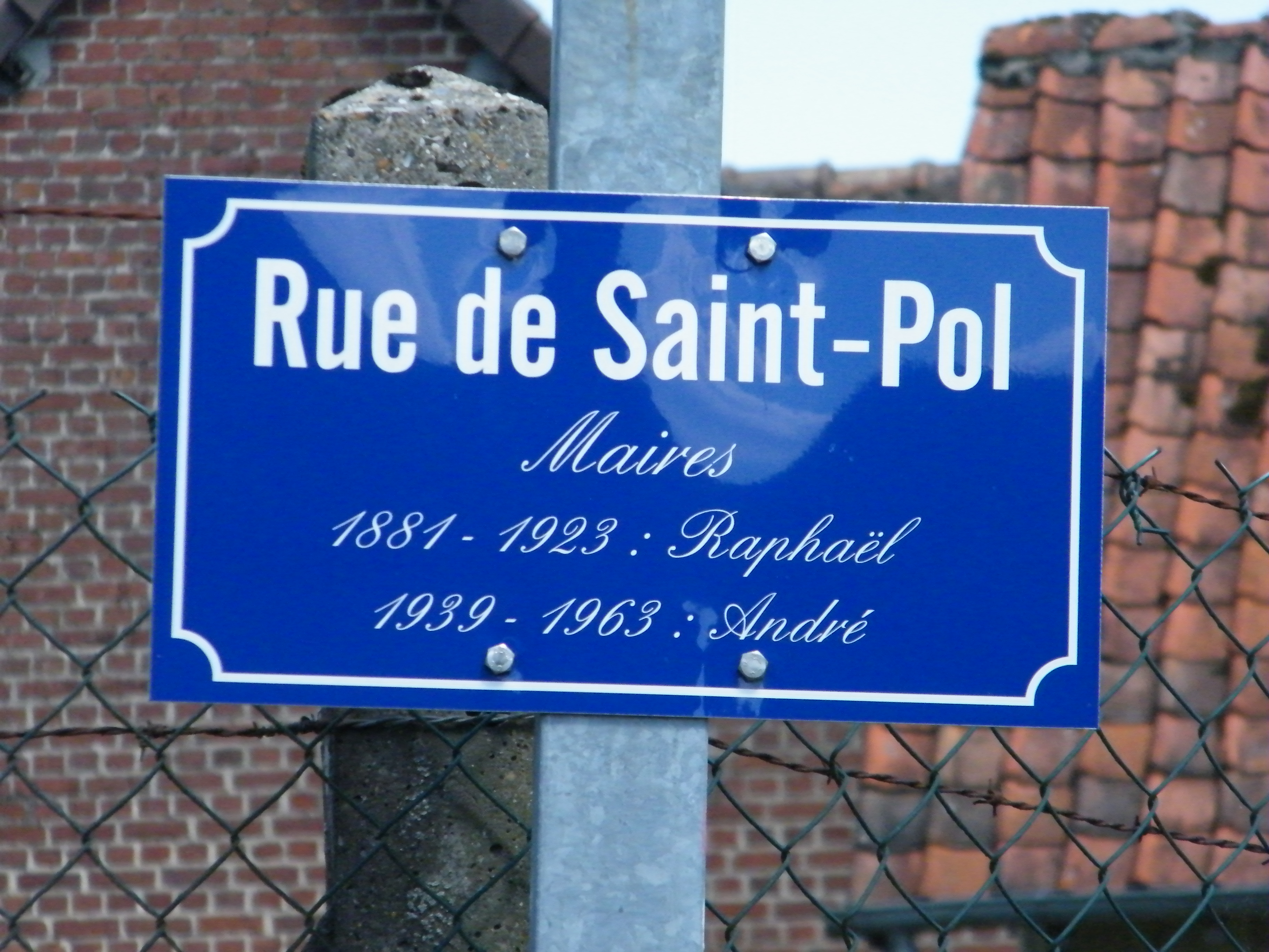 Francières (Somme, France), anciens maires, nom de rue.